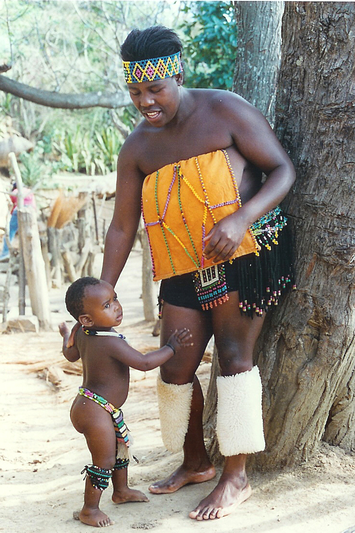 Mamm a Kand am Zuluduerf